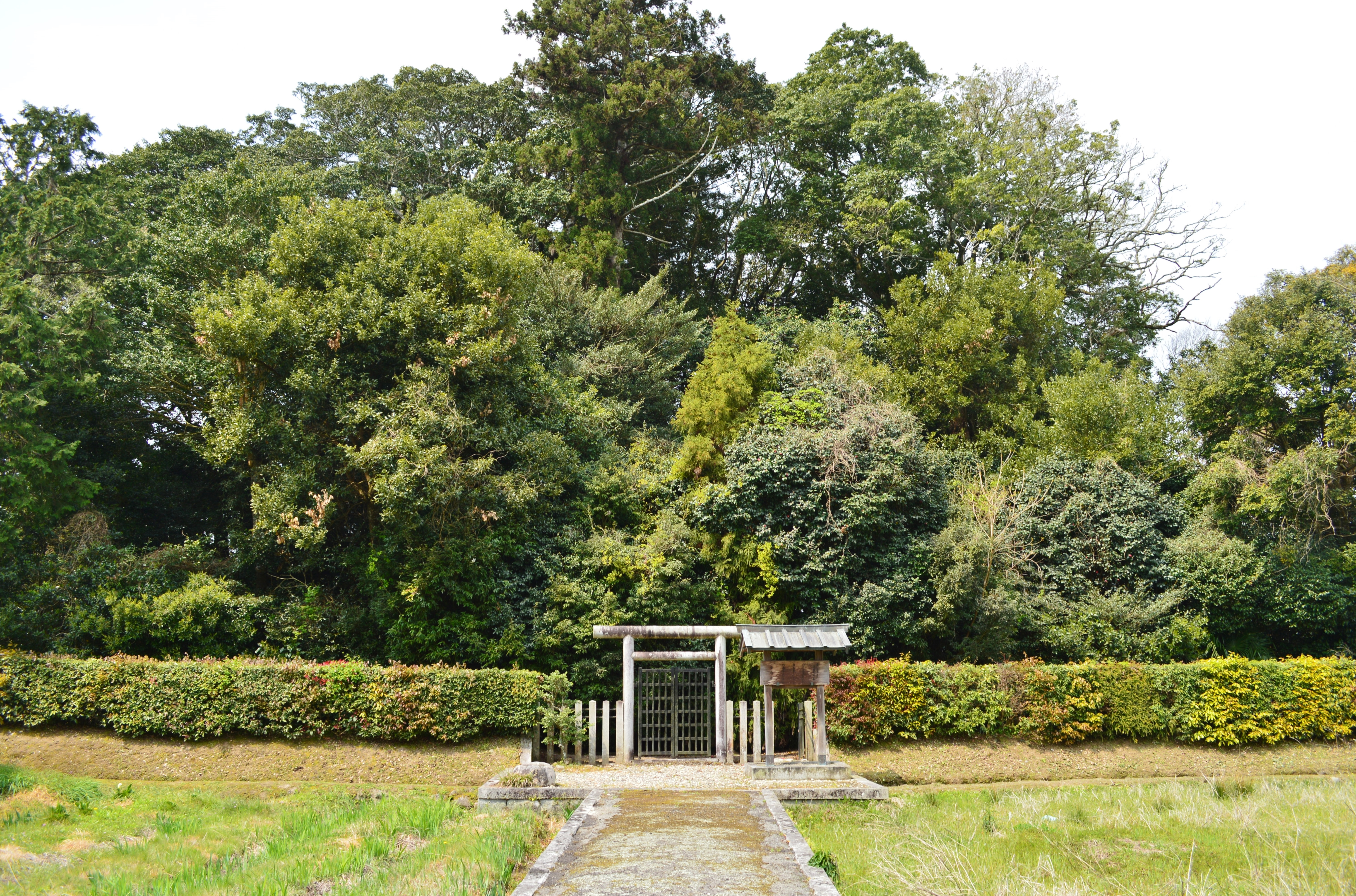 息速別命墓 拝所